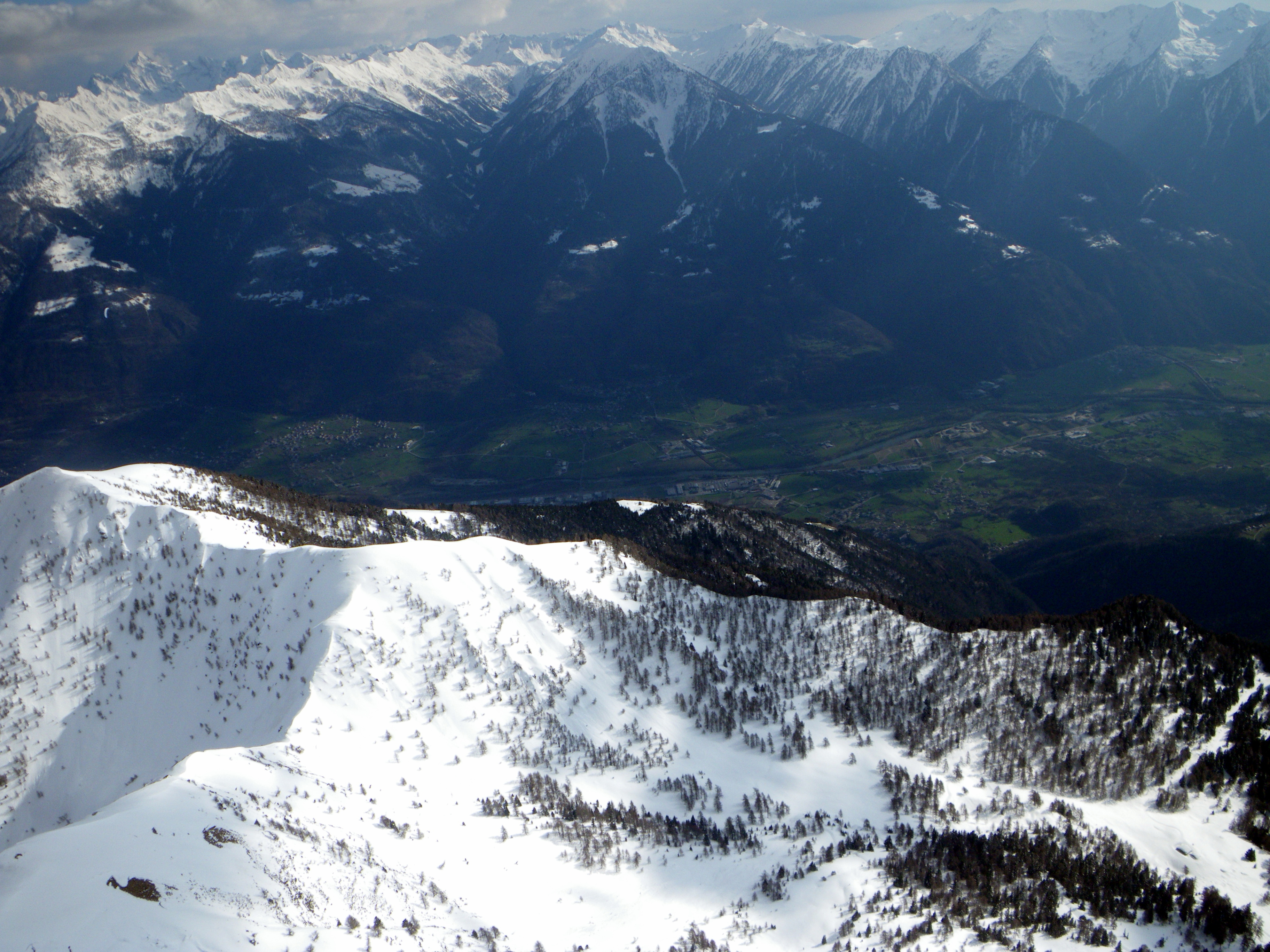 Cosio